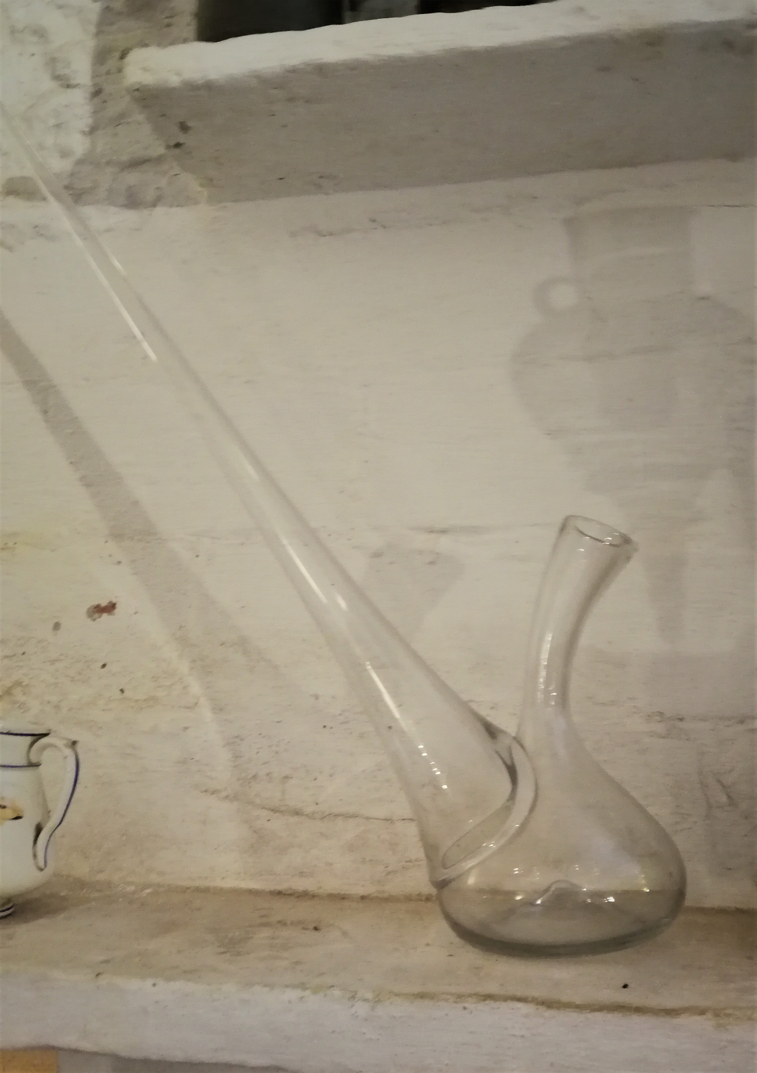 Katalanischer Porró (Schnabelkrug zum Weintrinken mit überlangem Schnabel, Museo del Vidre de Perelada)